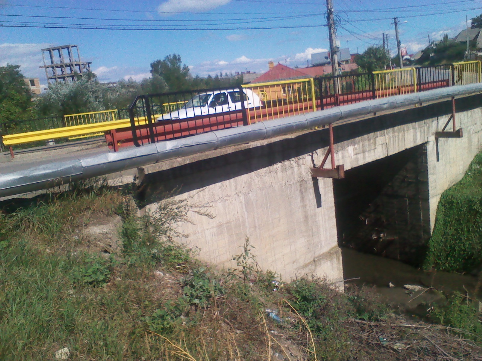 Aceasta este o poză cu partea dreaptă a podului de piatră Șoldănești (mergând din Fălticeni spre Șoldănești). 01, 146548.01.01)